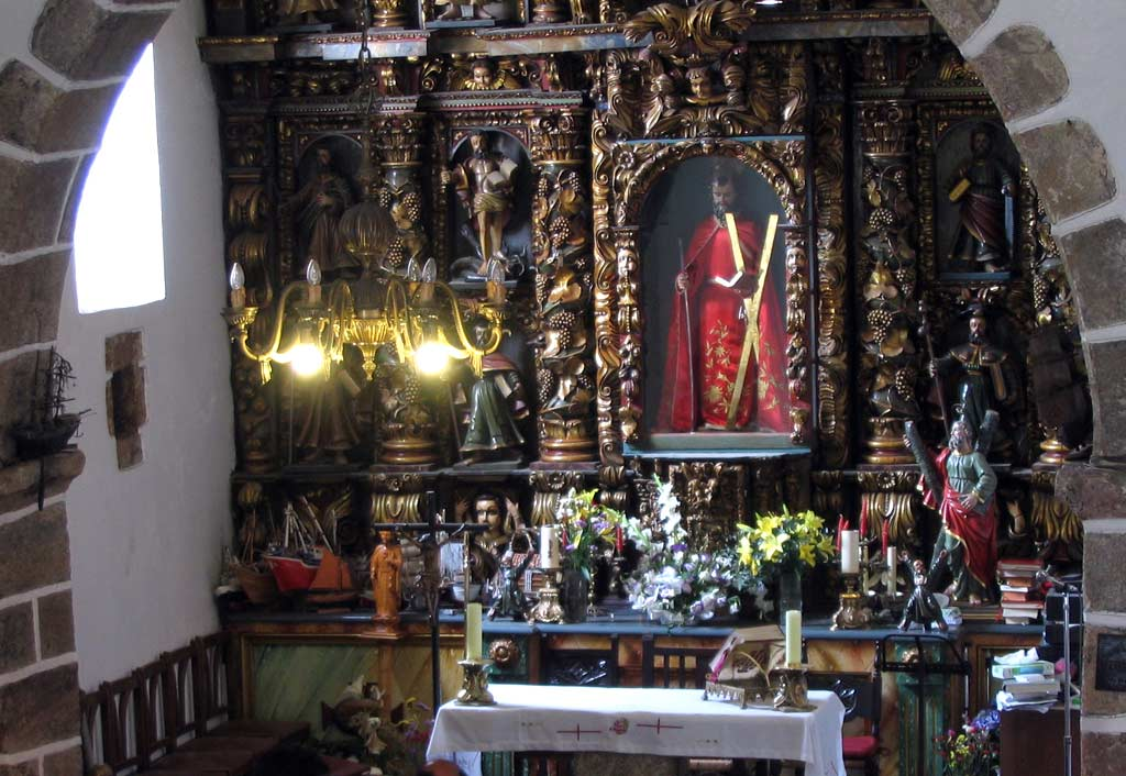 Santo André de Teixido. InteriorTeixido3